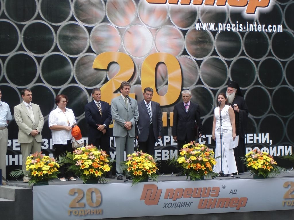 По случай 20 годишнината от основаването на фирмата, президентът на България Георги Първанов произнася поздравителна реч.